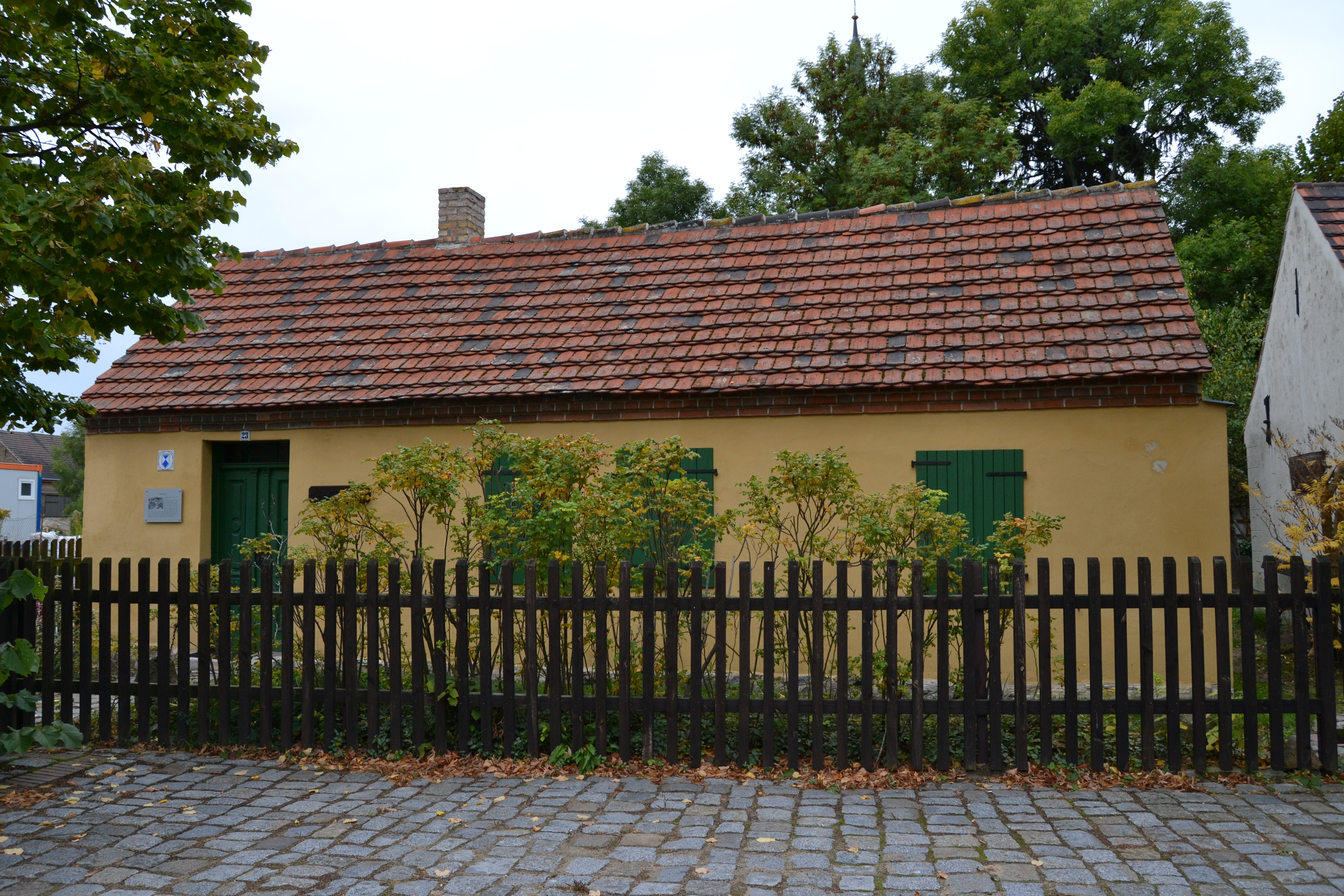 Büdnerhaus mit Stallgebäude, Dorfstraße 23 in Petershagen, Petershagen/Eggersdorf